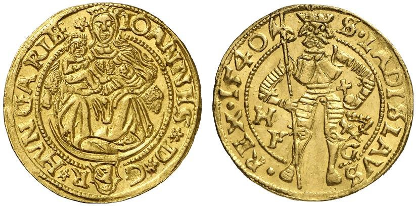 Szapolyai János 1540-ben vert aranypénze